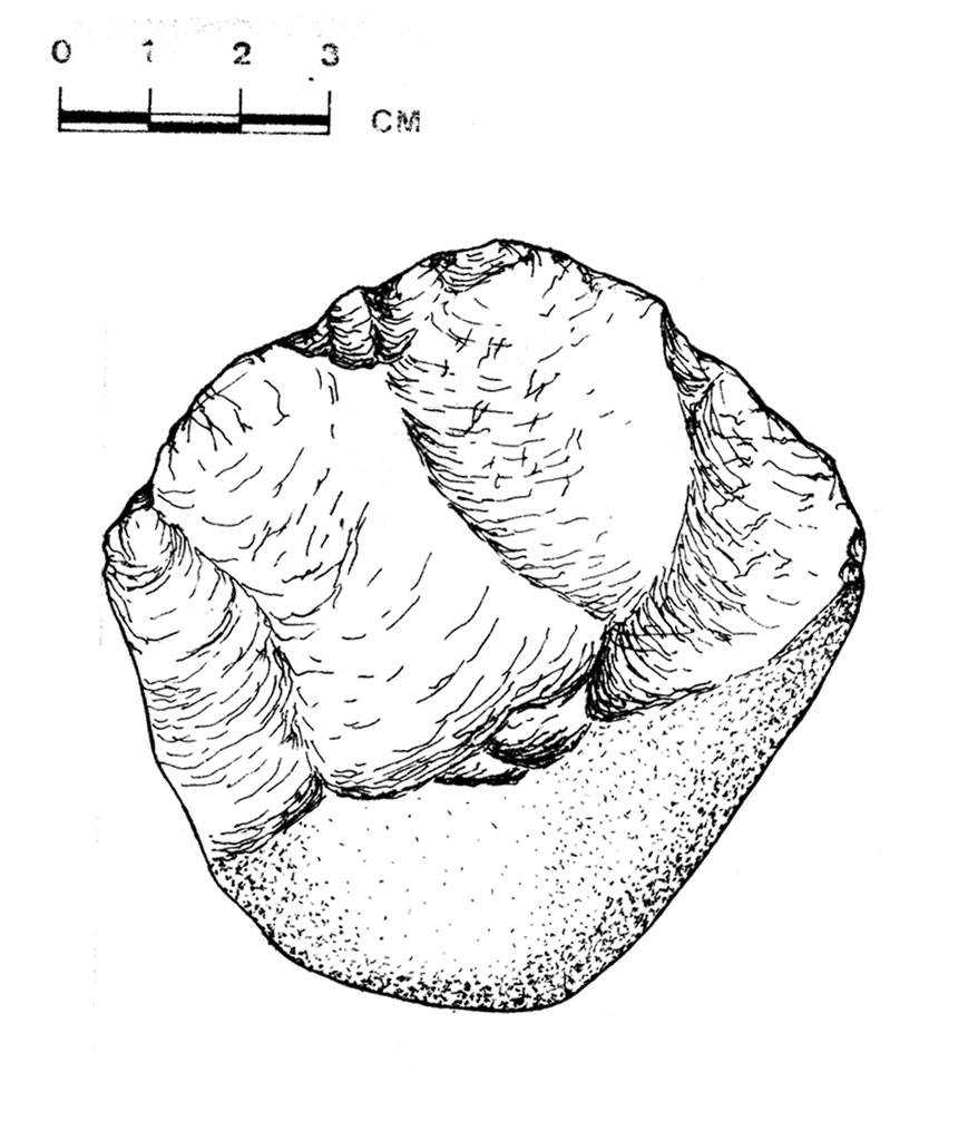 מקצץ דו-פני על חלוק בזלת רפליקה מודרנית